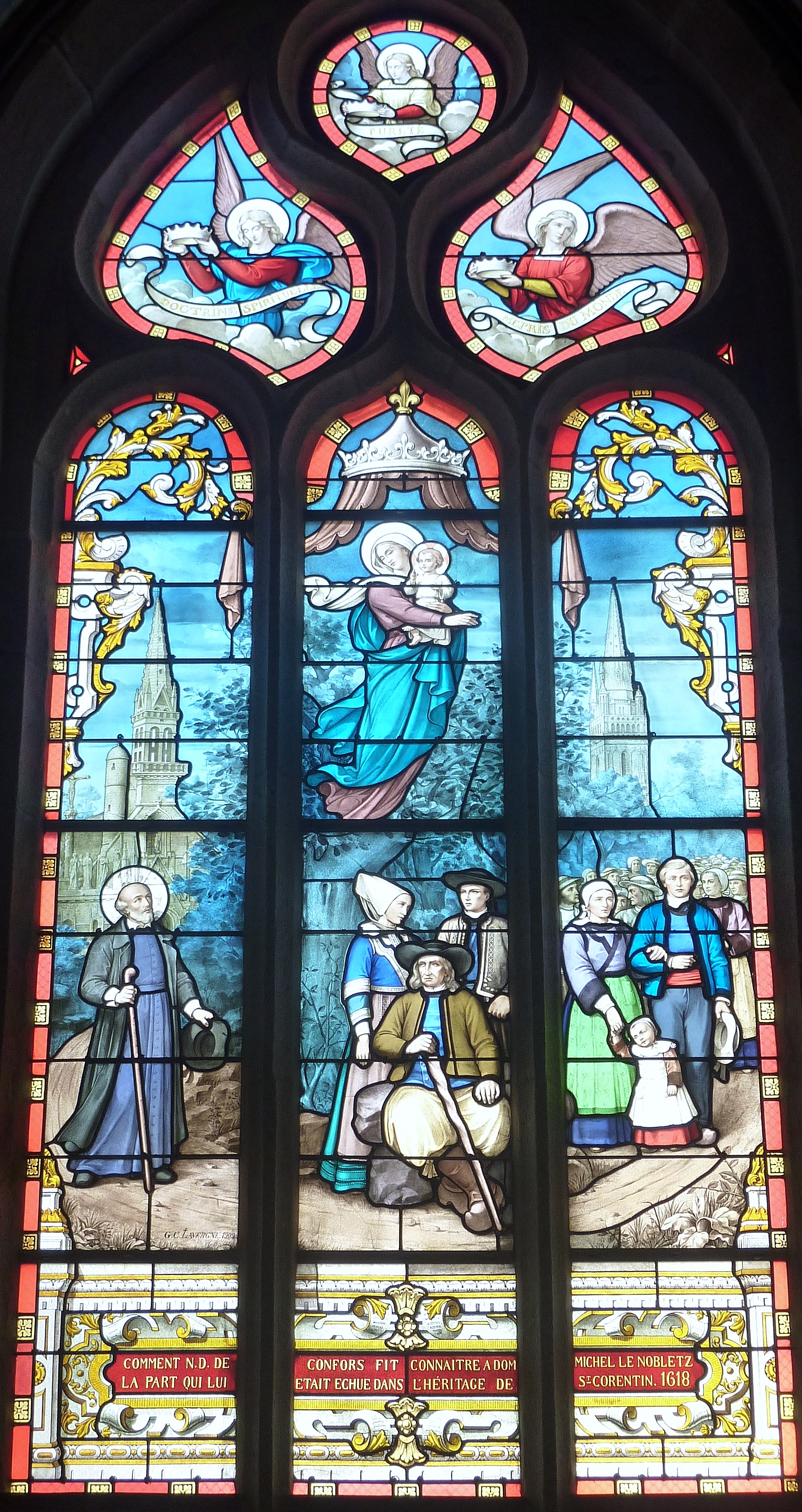 Ploaré : église paroissiale Saint-Herlé, vitrail "Notre-Dame de Confort apparaissant à Michel Le Nobletz" (1909, atelier Lavergne).